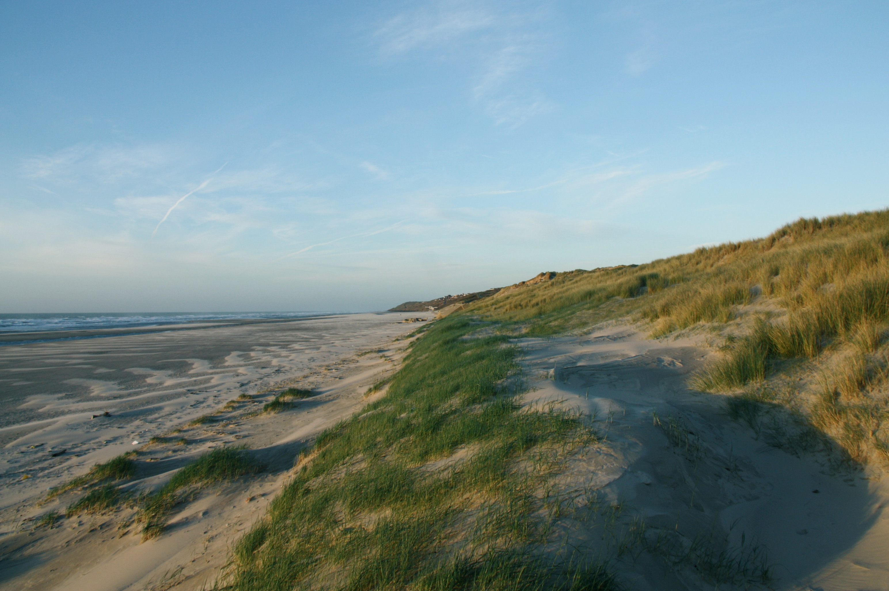 Parc naturel régional des Caps et Marais d'Opale - Parc naturel d'ECAULT - dunes d'Ecault